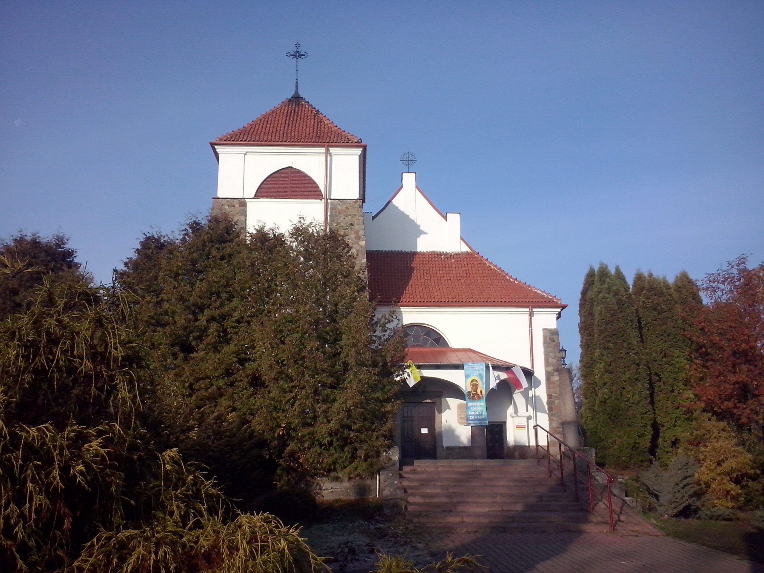 Zatory (gm. Zatory, pow. Pułtusk, diec. płocka) - kościół NMP Królowej Świata (parafia Św. Małgorzaty)